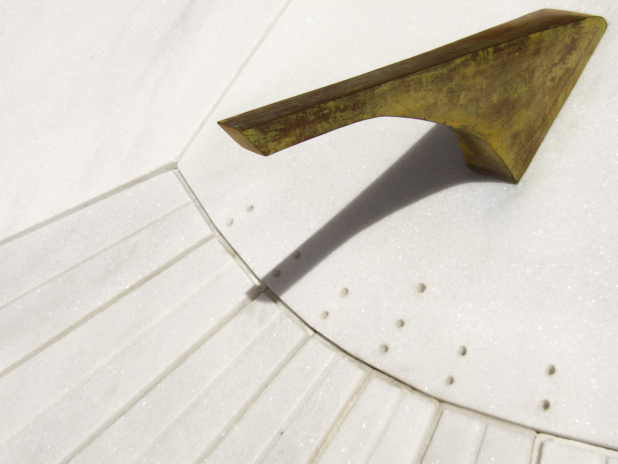 Analemmatos - Relógio solar de reclinação Sul (South reclining sundial), Oficina Cerâmica Francisco Brennand, Recife, Pernambuco, Brasil. LAT 8°03’8,5”S LON 34°58’28,8”W. Arquiteto: Fernando Almeida.